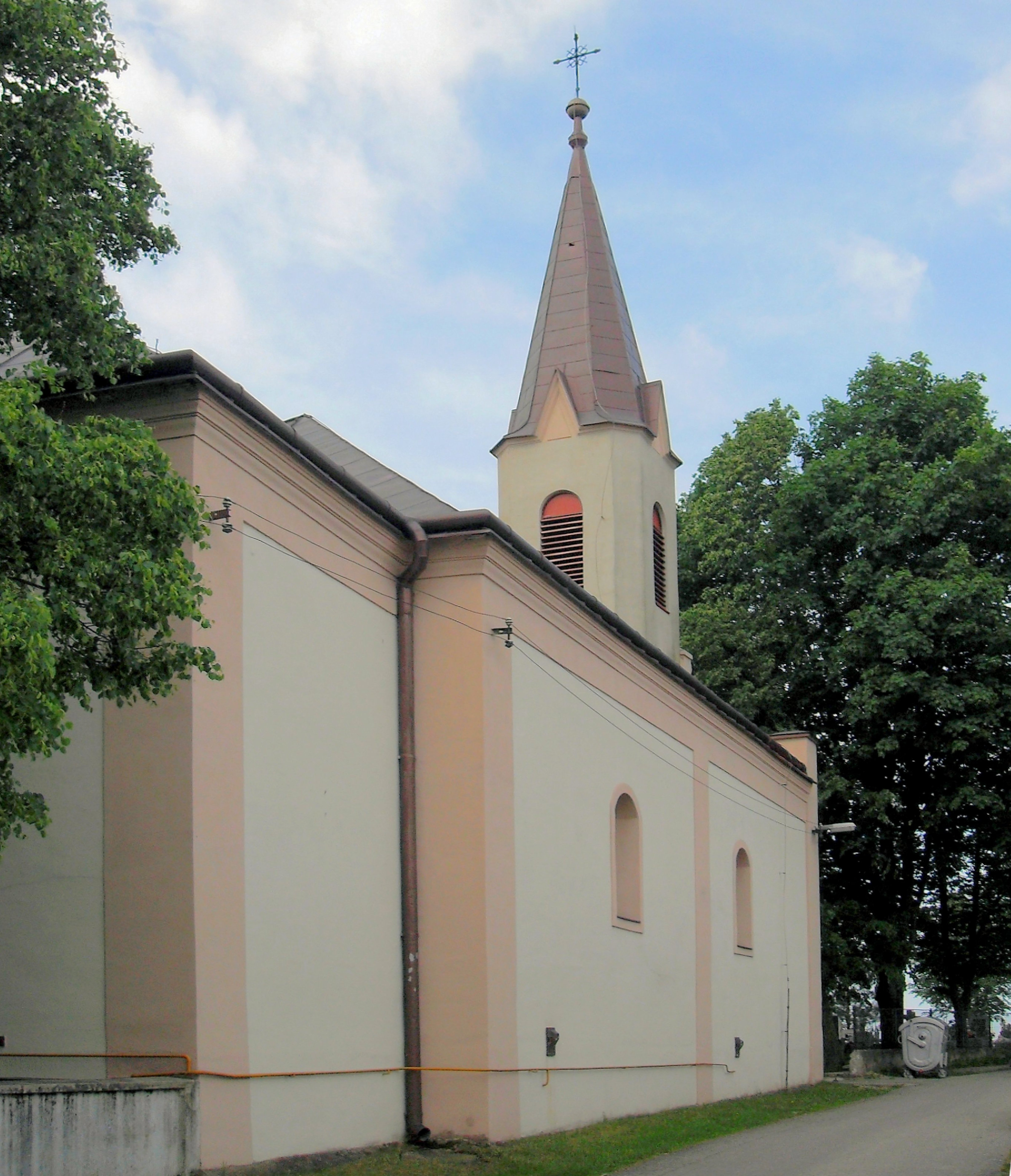 Bočiar, Rímskokatolícky Kostol svätého Imricha